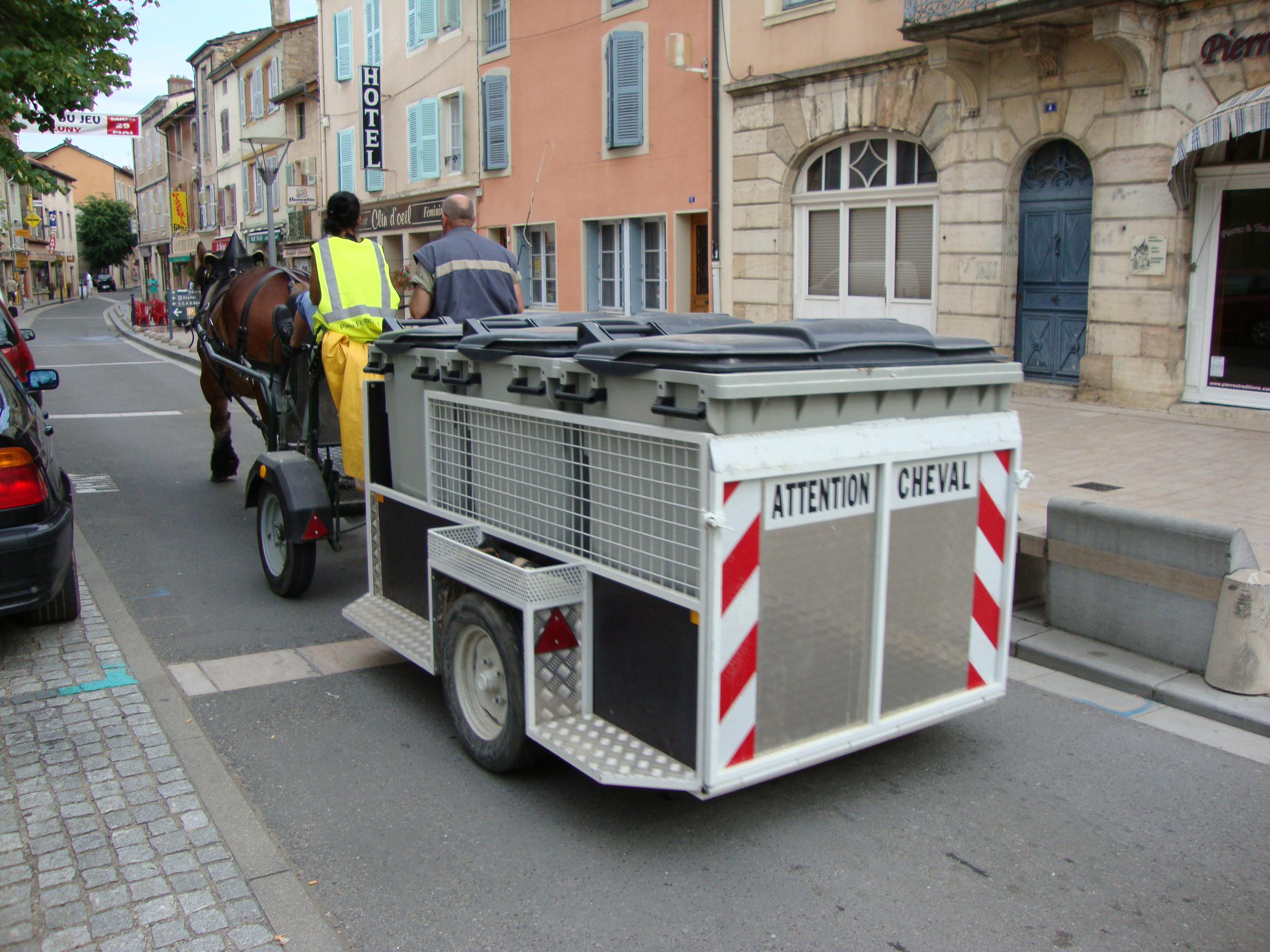 A Cluny (Saône-et-Loire, France) le ramassage des déchets est assuré par un cheval de trait auxois